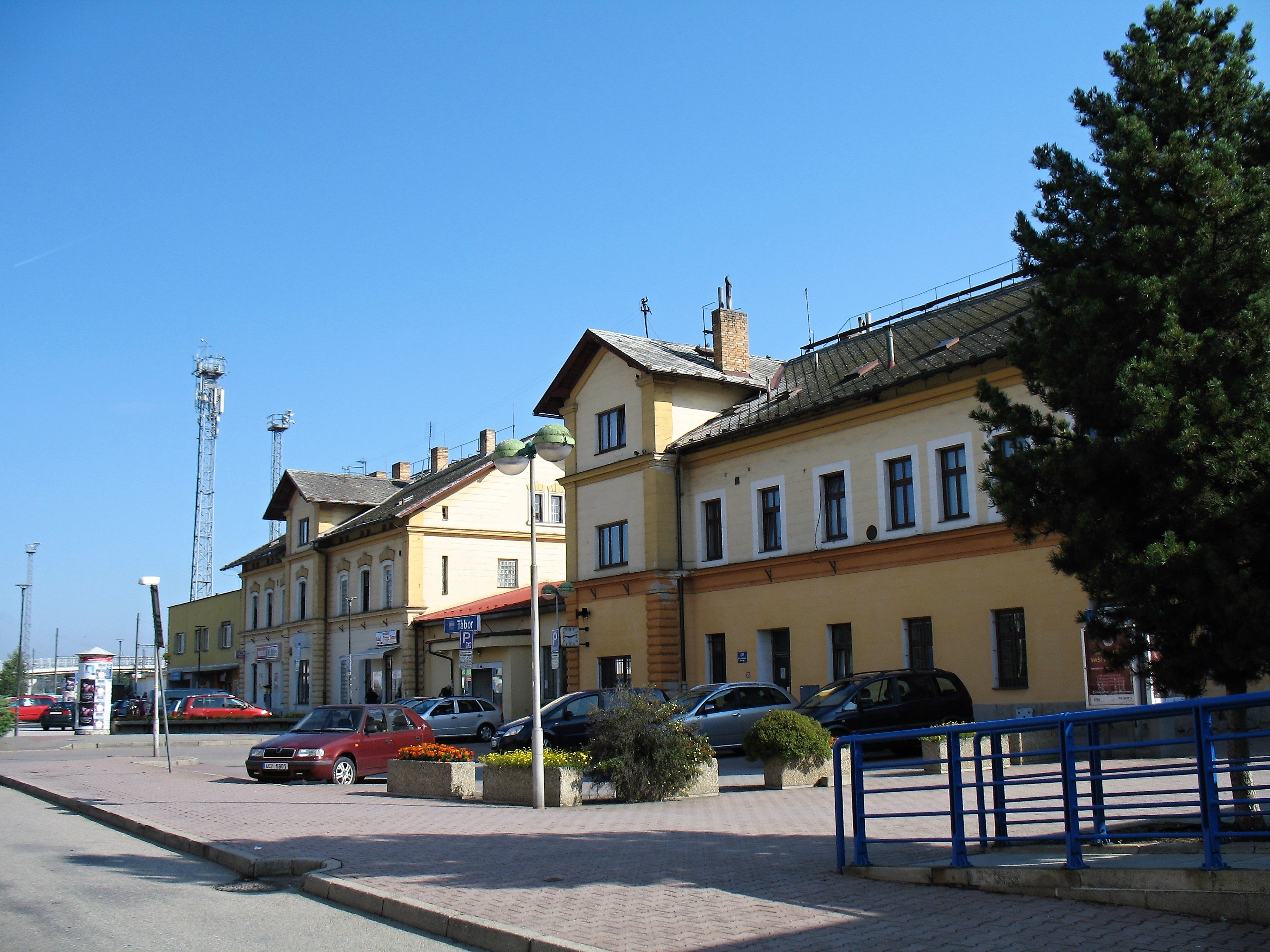 Tábor train station, Czech Republic